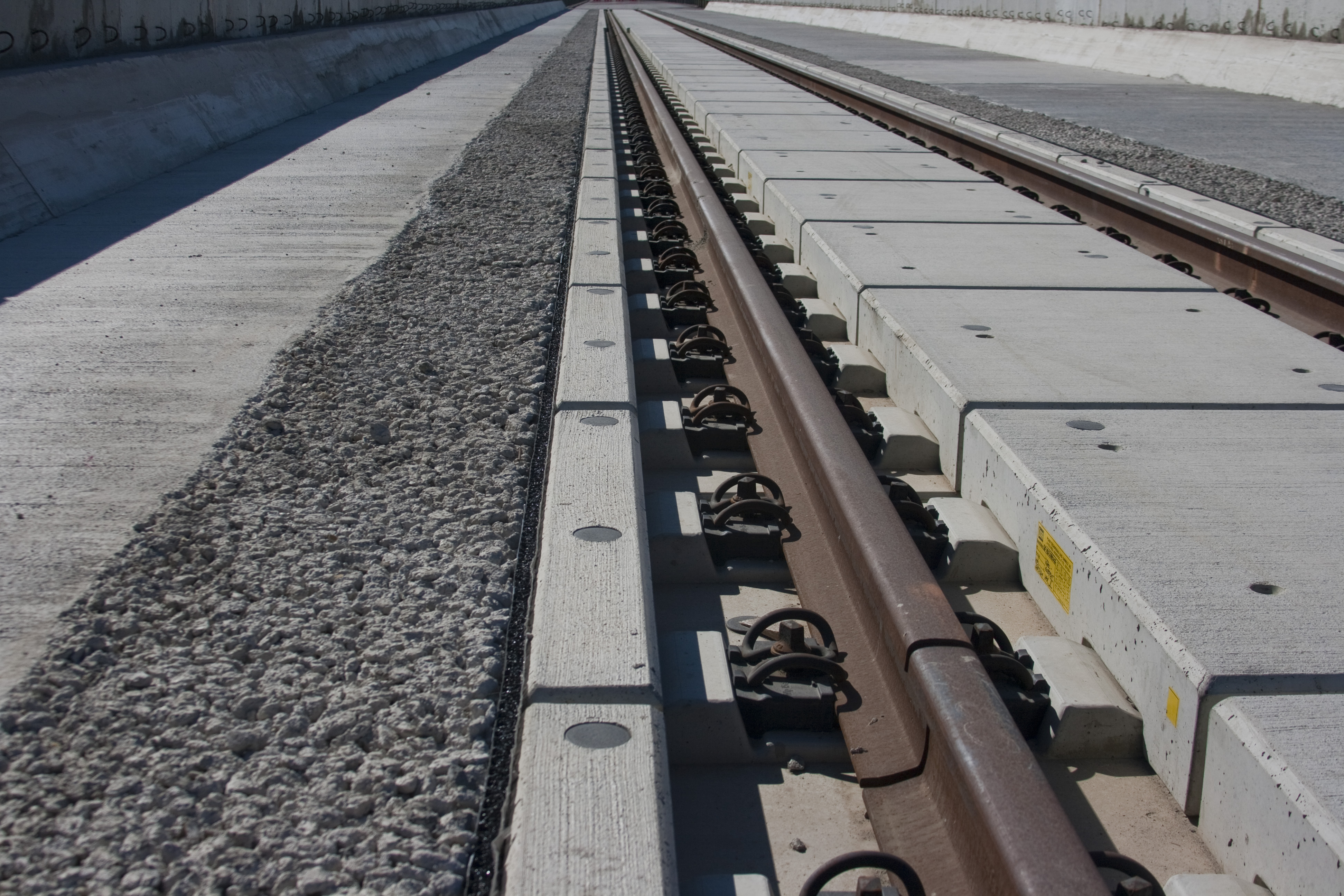 Versuchsstrecke Feste Fahrbahn für Rettungskräfte (Befahrbarkeit im Tunnel) am Ostportal des Osterbergtunnels